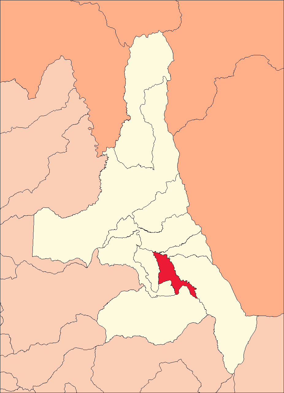 Área del distrito de Luyando.